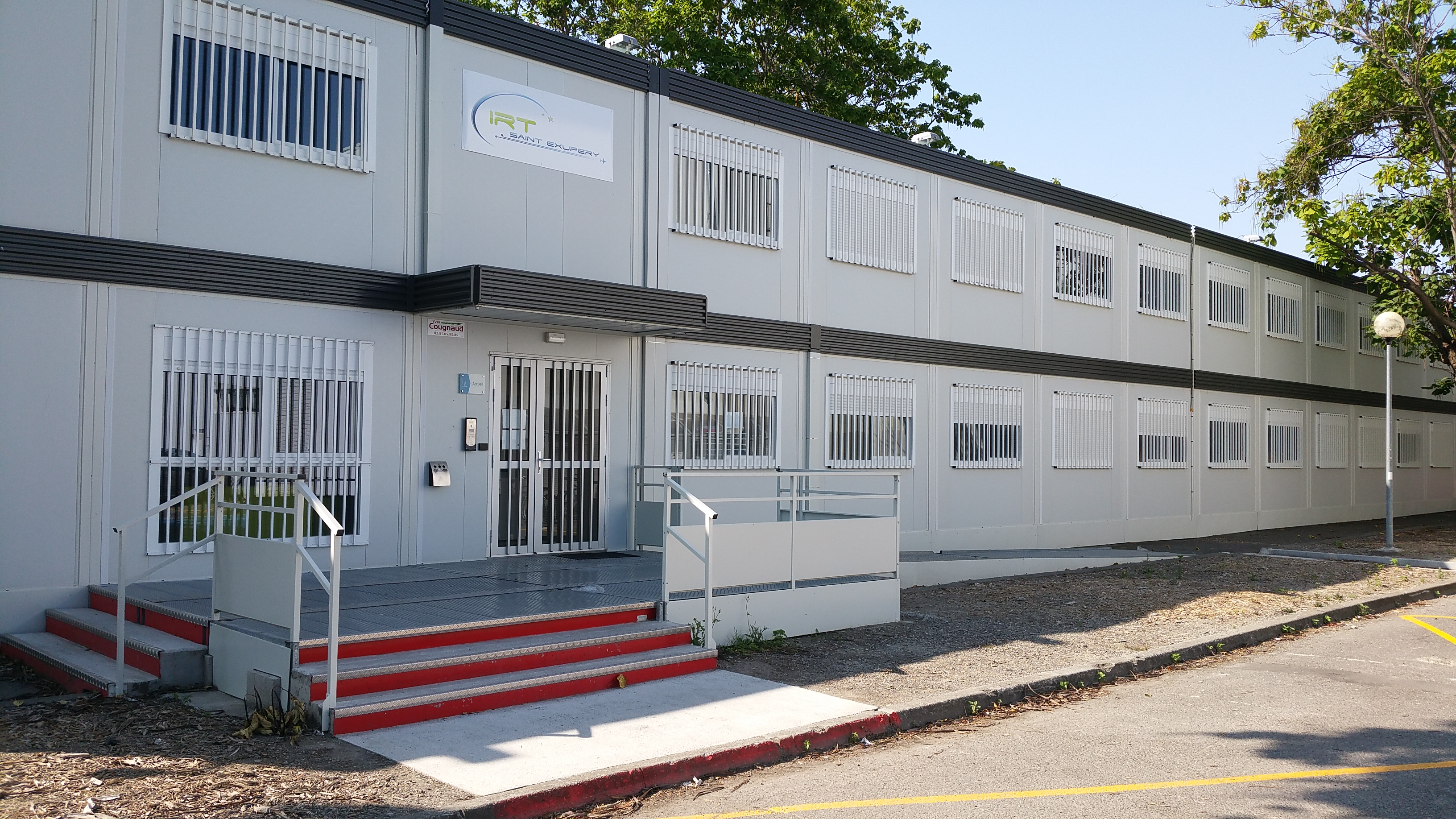 Locaux Aerospace VAlley dans les bâtiments modulaires de l'IRT St-Exupéry, sur le Campus de l'Université Paul Sabatier à Toulouse